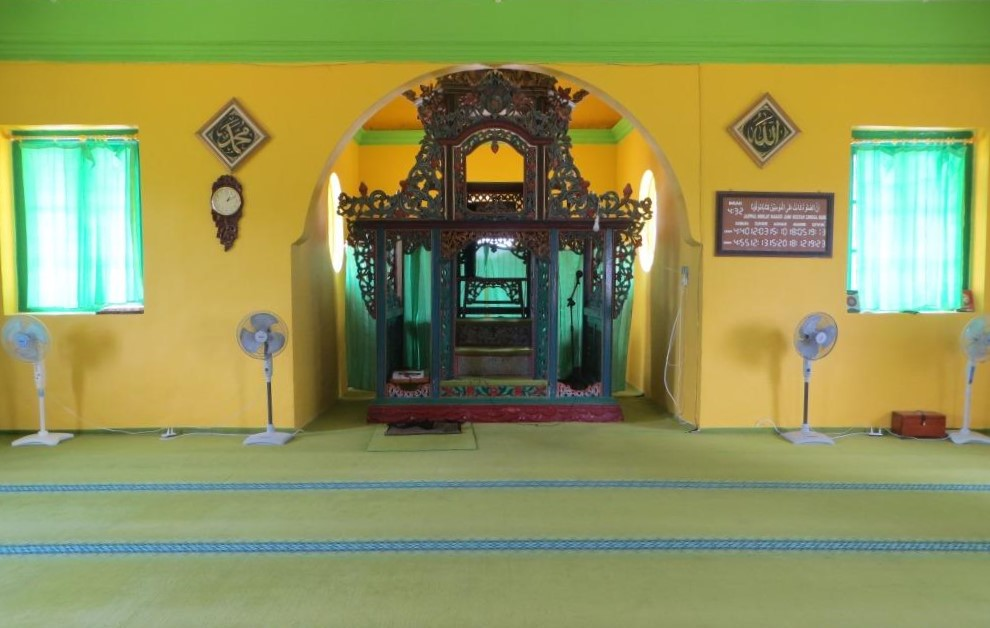 Masjid Jami Sultan Lingga ruang salat